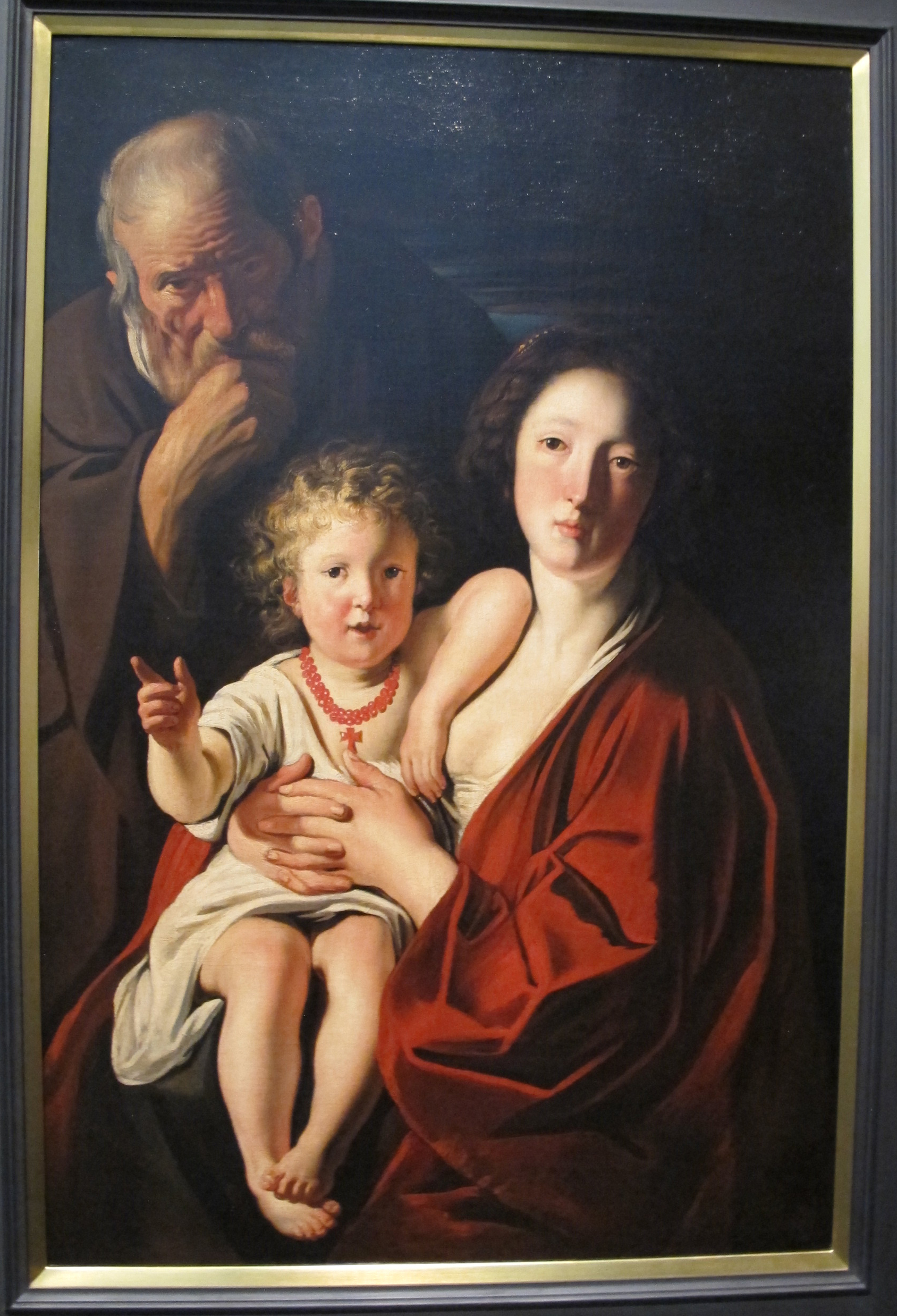 sacra famigliaHoly Familytitle QS:P1476,it:"sacra famiglia" label QS:Lit,"sacra famiglia"